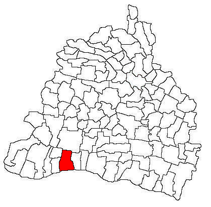 Amplasarea în cadrul județului.